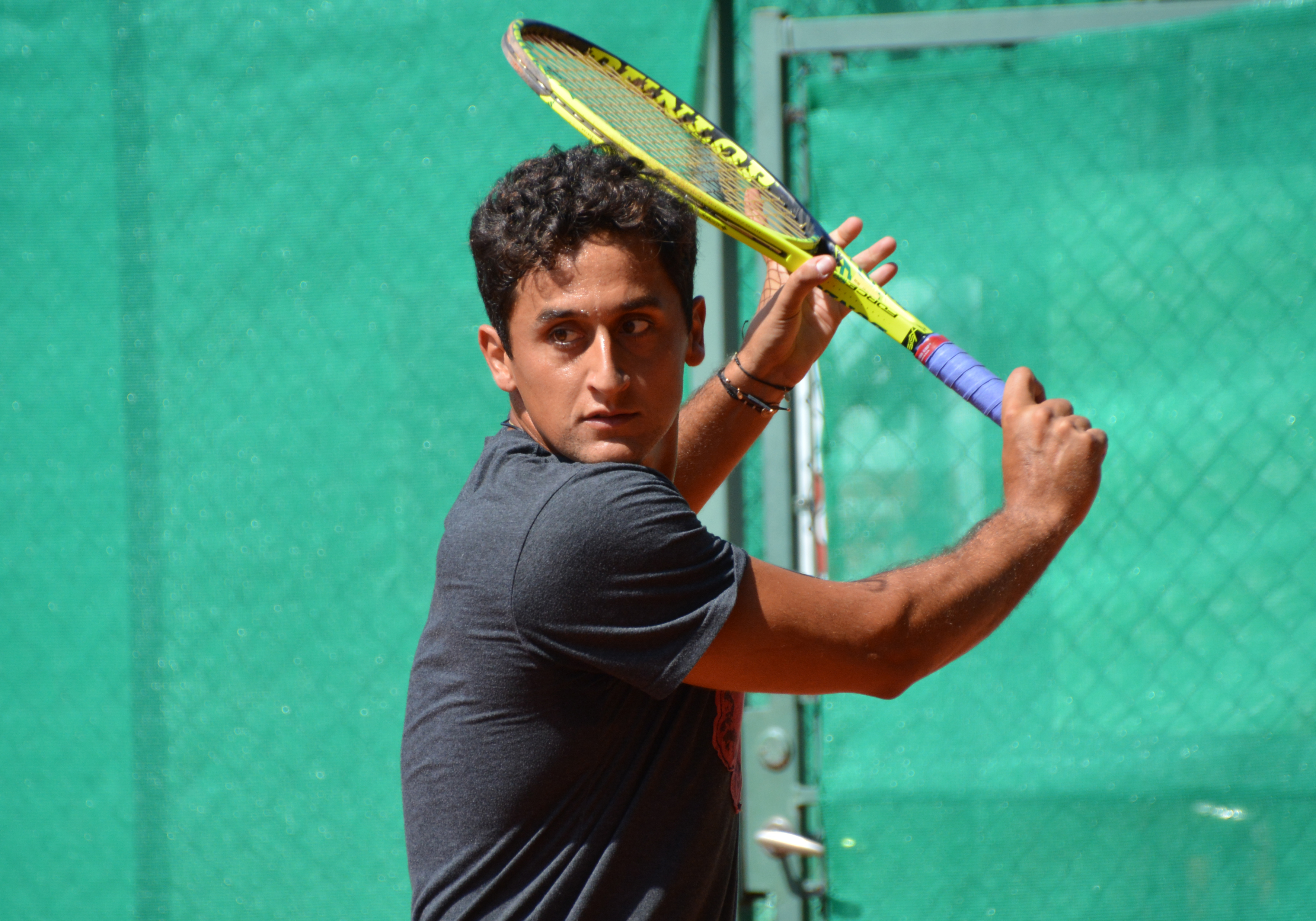 ATP Båstad 2015